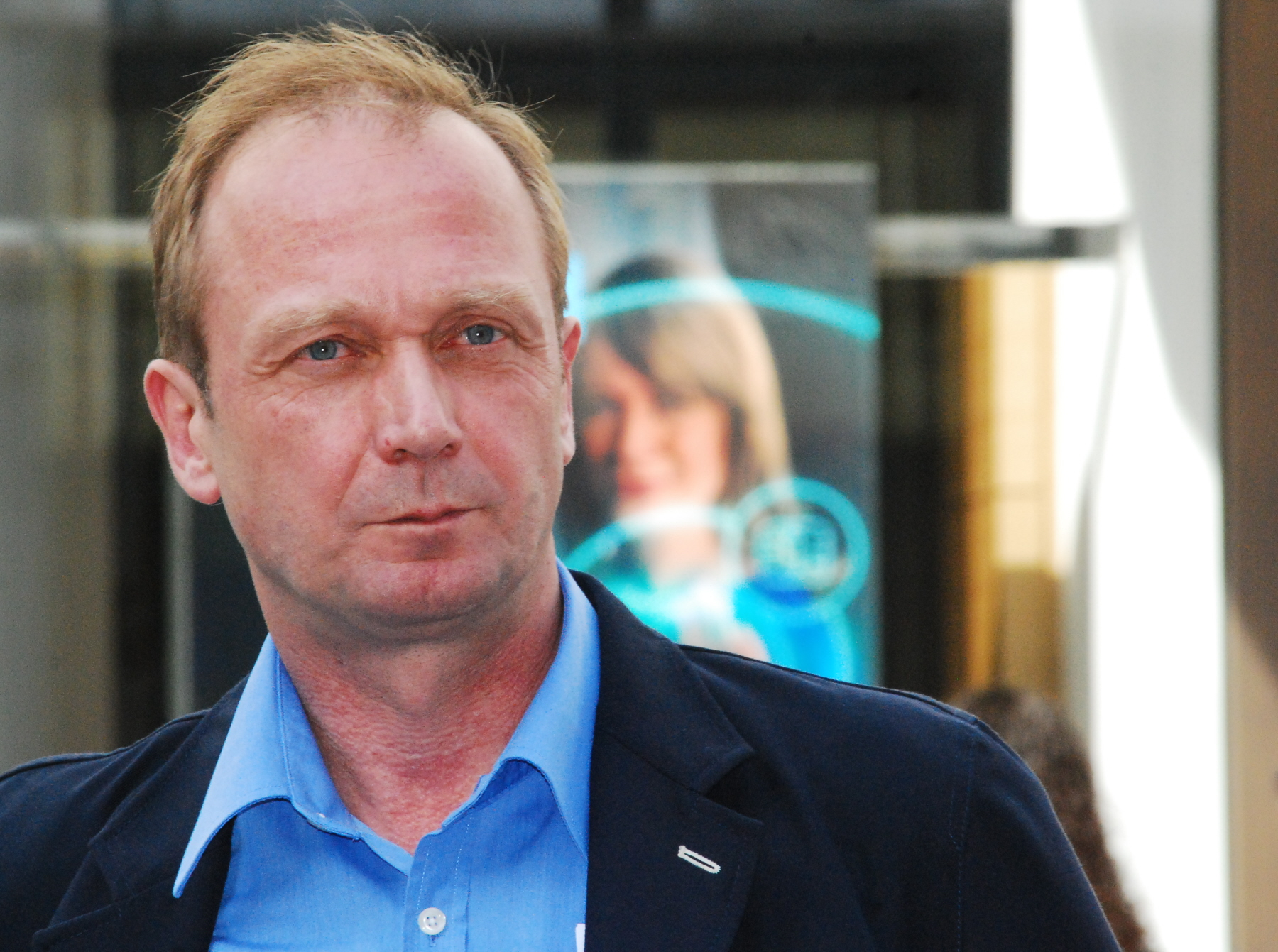 Heimo Zobernig, fotografiert anlässlich der Eröffnung der temporären KÖR-Installation "Humiliation" am Graben in Wien-Innere Stadt.